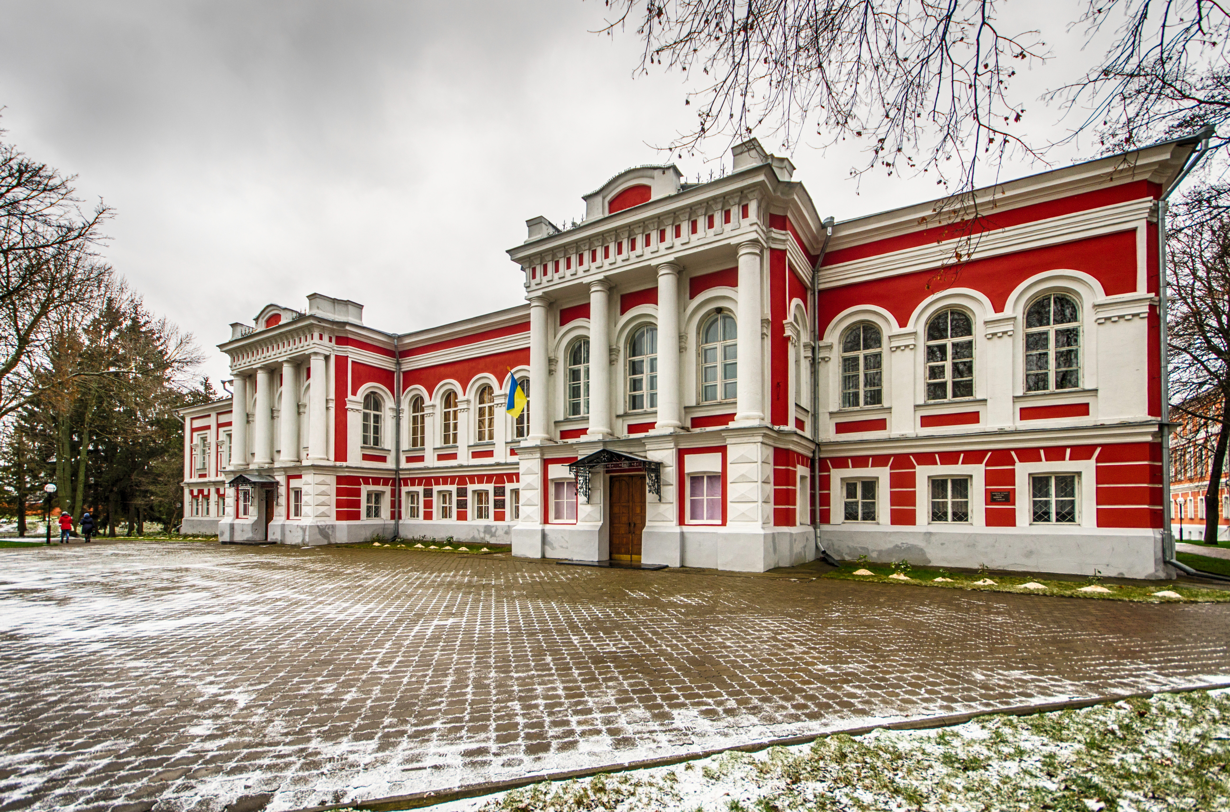 Гуманітарно-просвітницький комплекс, Глухів, вул. Києво-Московська, 24